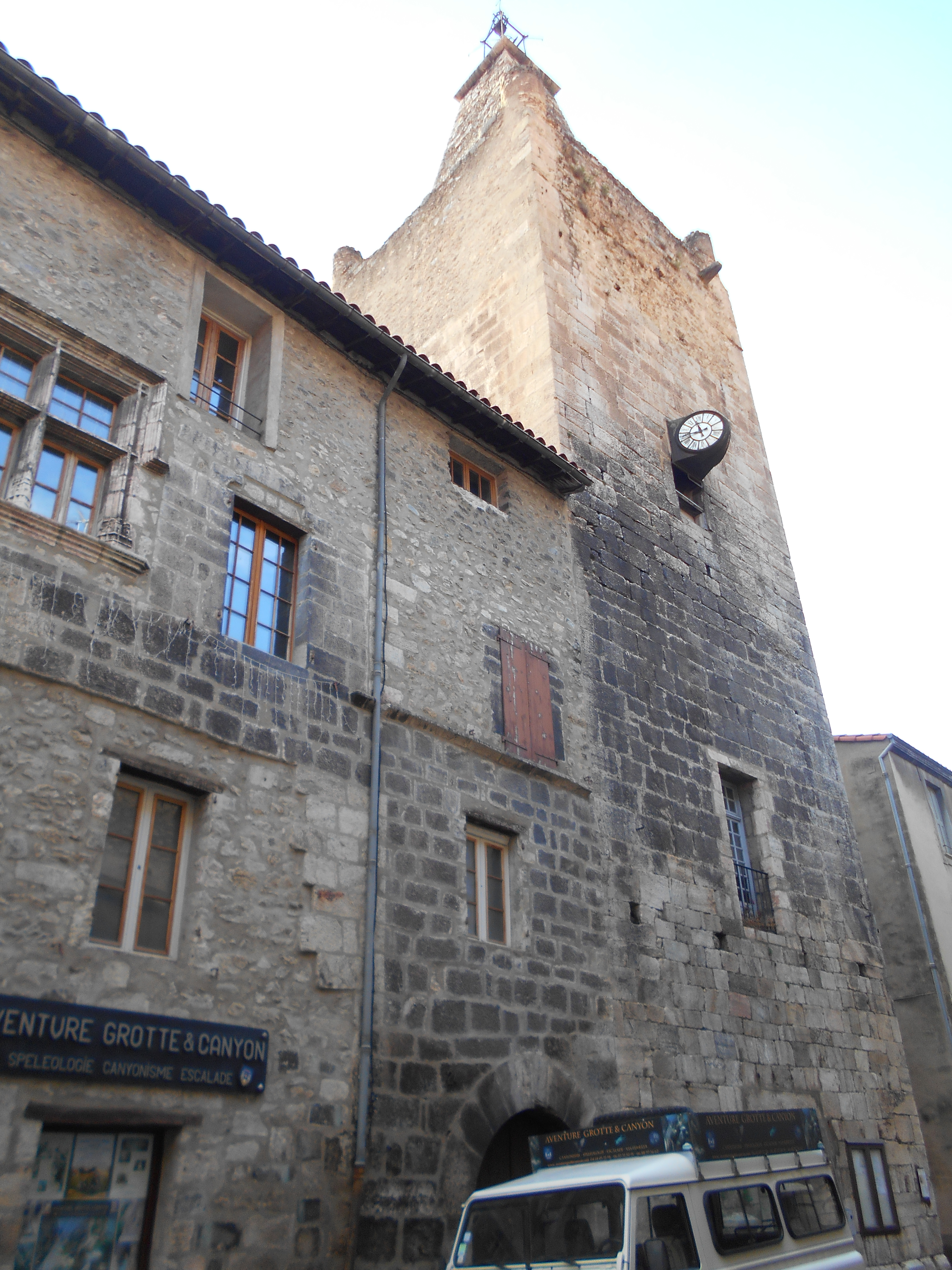 Casa de la Vila de Vilafranca de Conflent. Façana del Carrer de Sant Joan